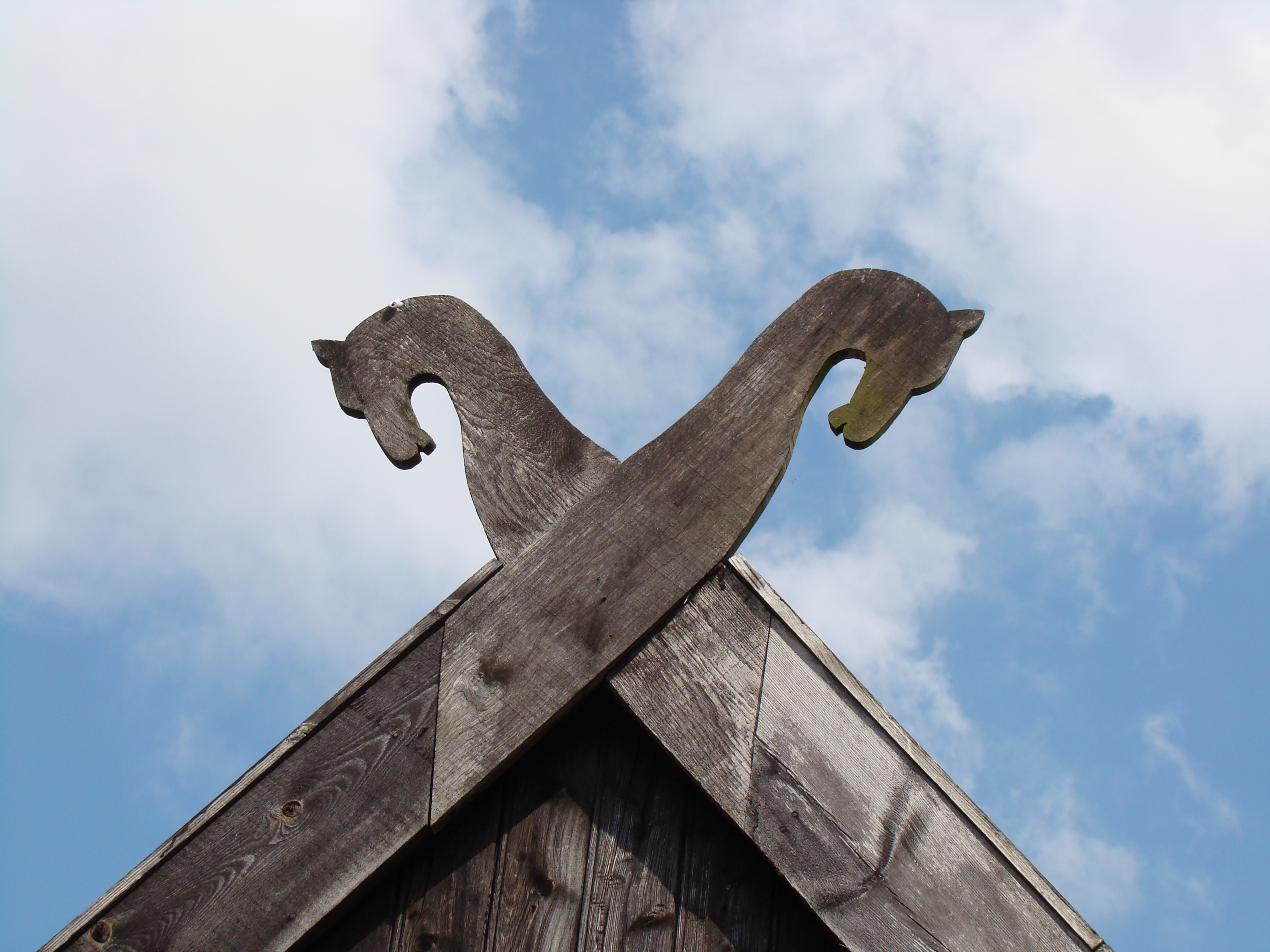 Giebelschmuck an Niedersachsenhaus